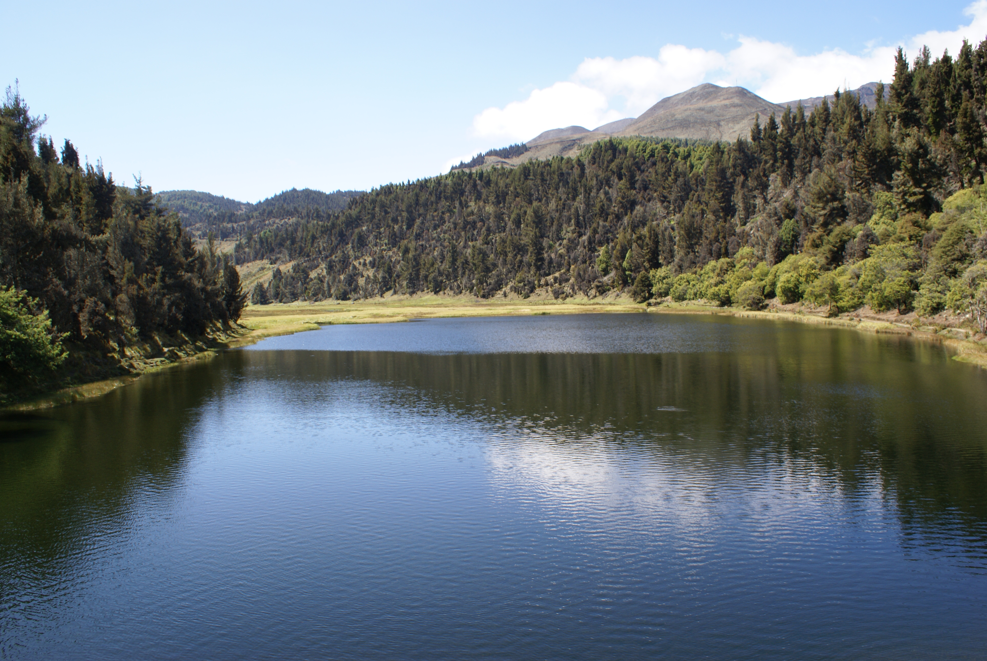 La laguna Victoria en el Parque Sierra Nevada estado Merida